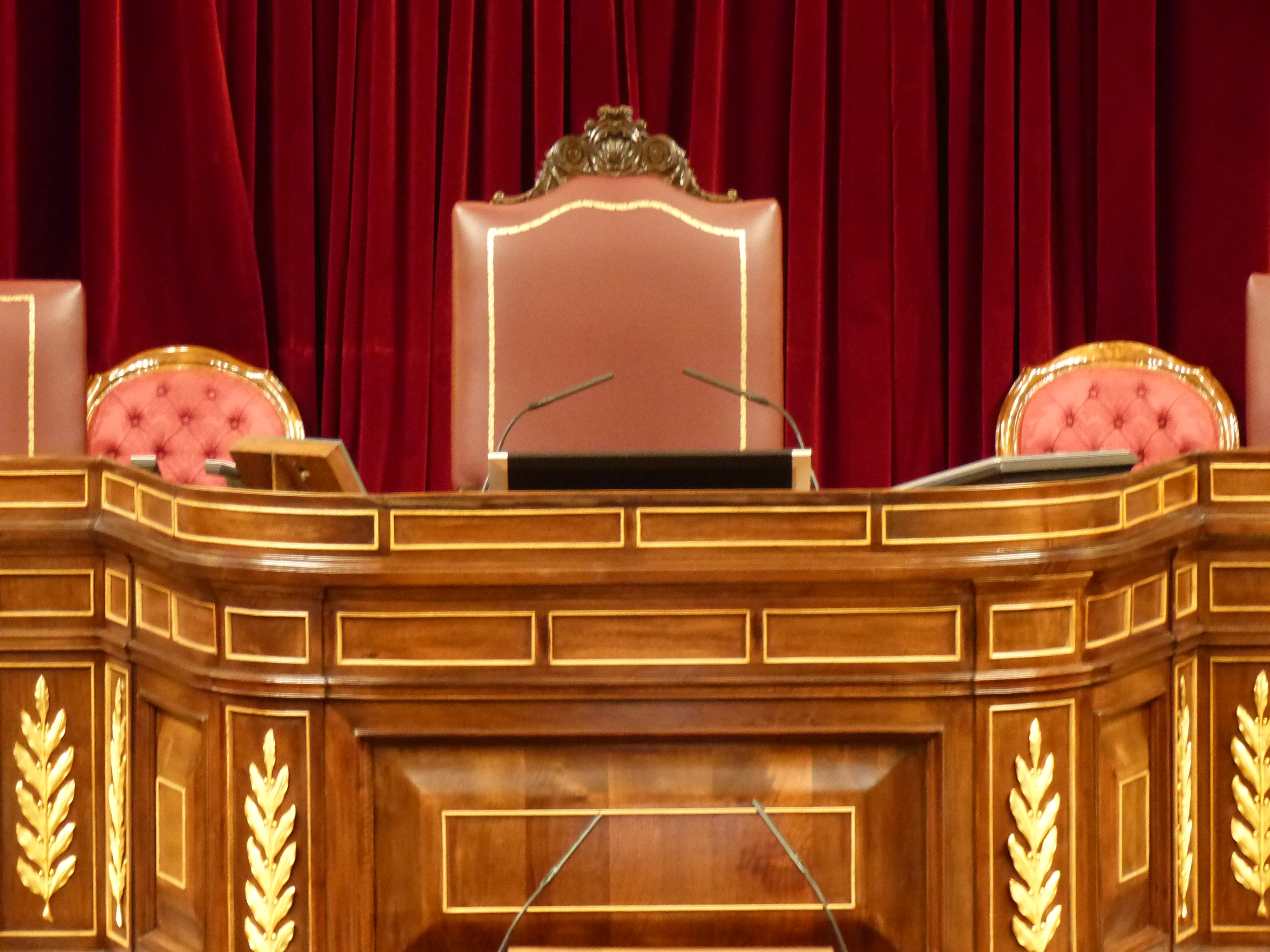 Congreso de los diputados, asiento de la tribuna